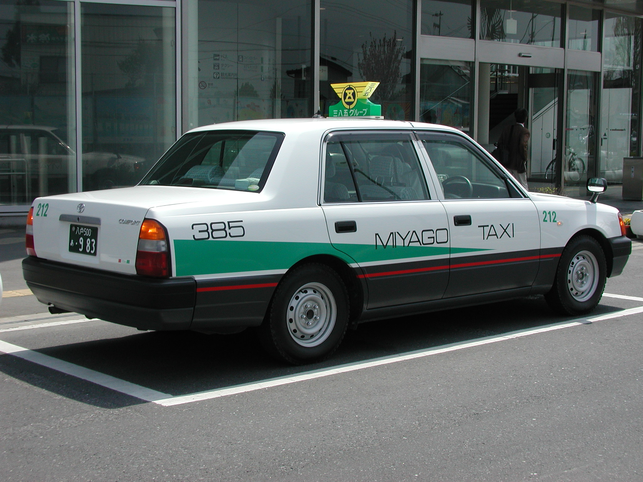 三八五観光ハイヤー（青森県三戸郡五戸町）：トヨタ・コンフォート 八戸駅西口（八戸市）にて